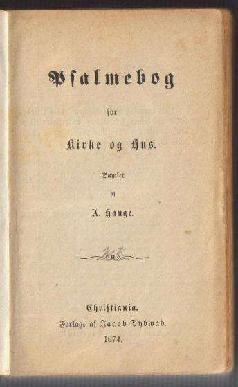 Tittelblad Hauges salmebok 1874